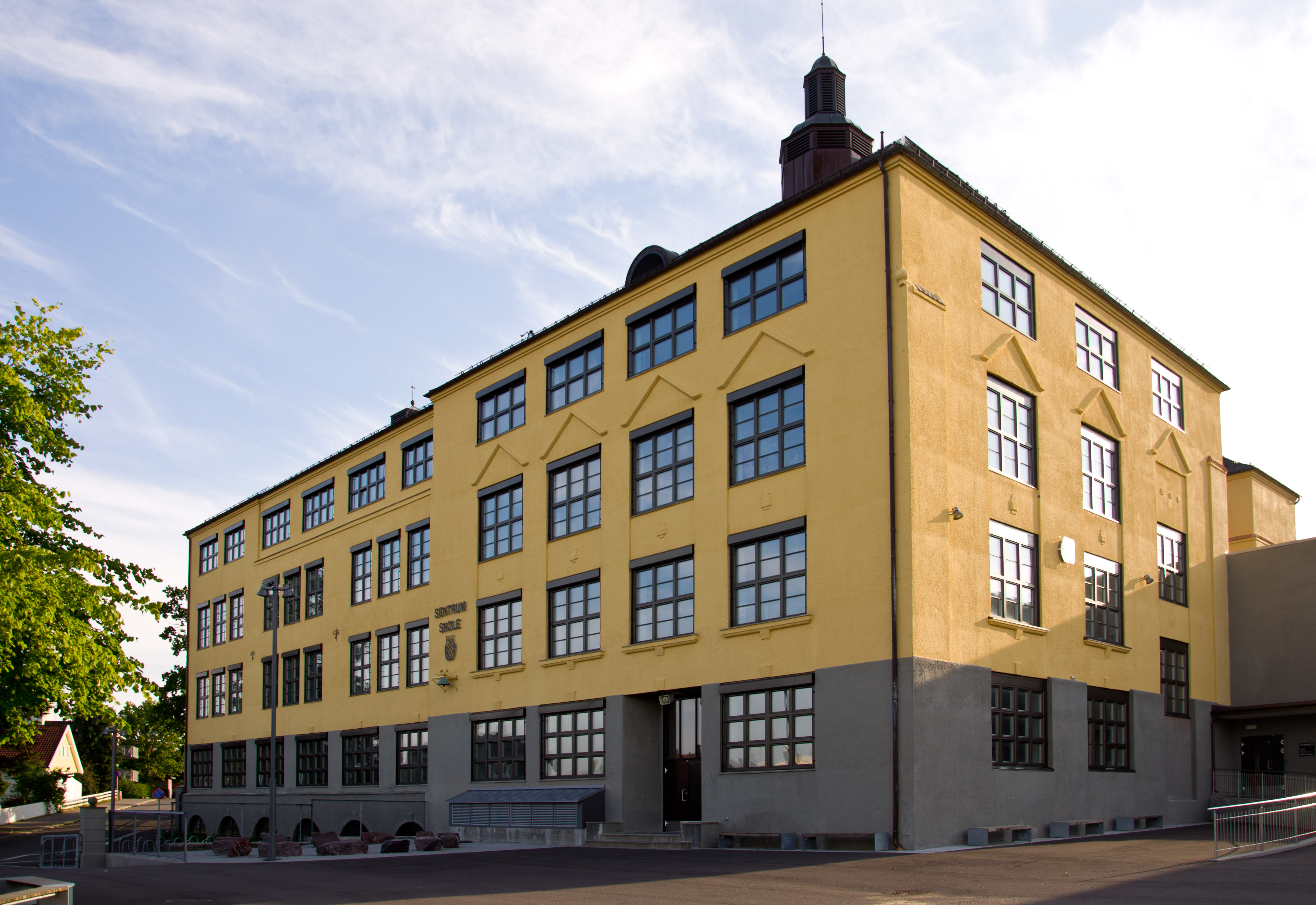 Sentrum Skole, Horten